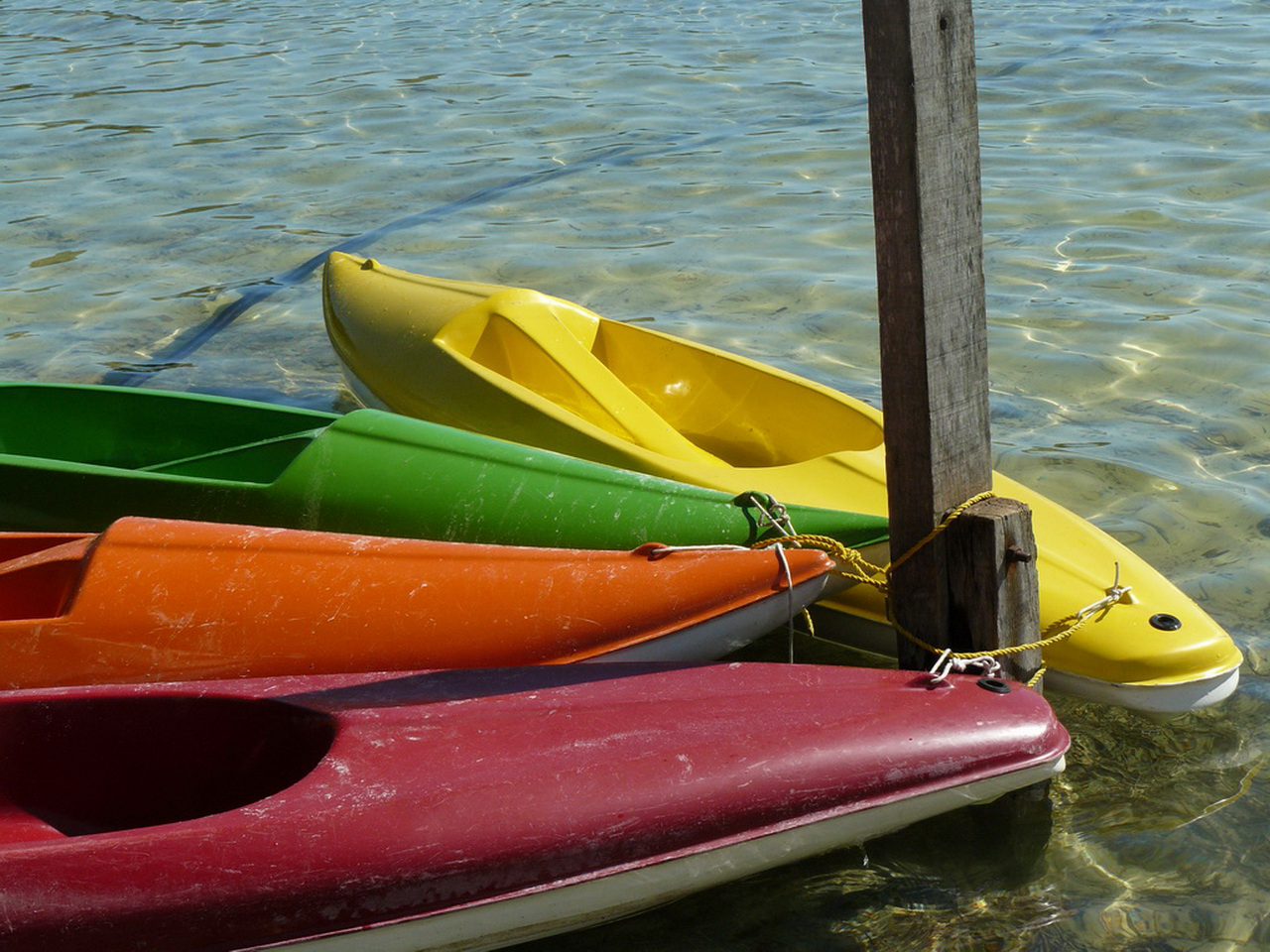 Fotos de los refugios y reservas de Itaipu, tomadas en los años 2007 y 2008 por mí.